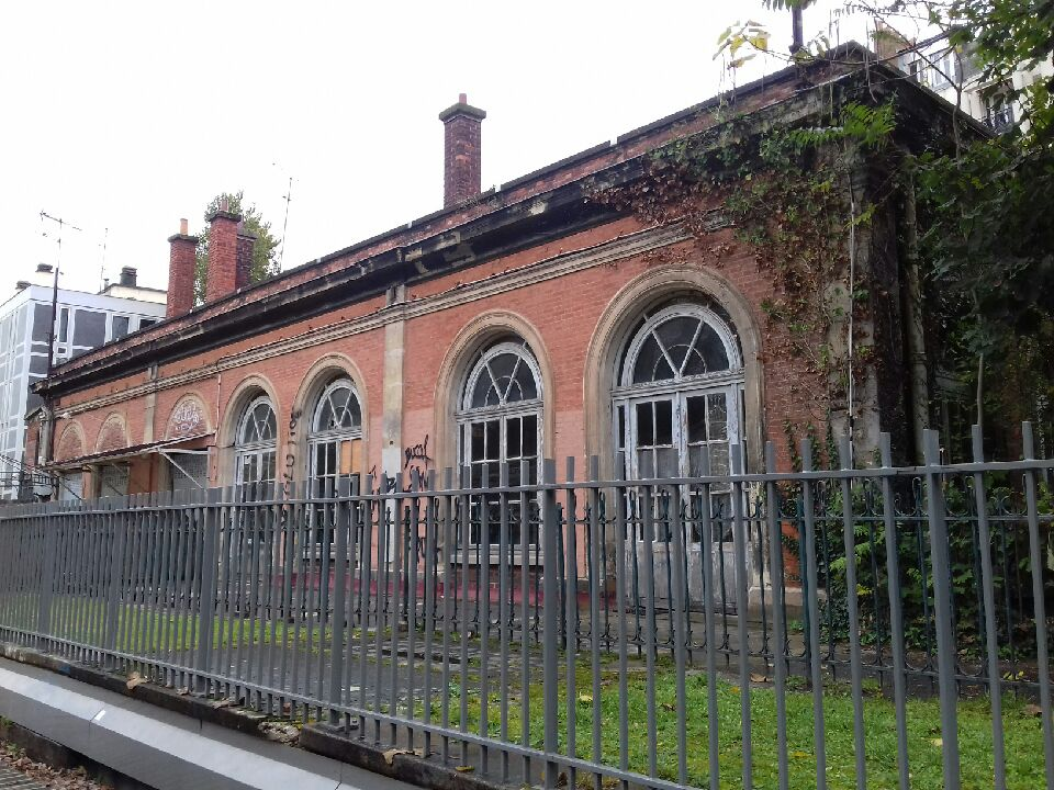 Petite Ceinture ferroviaire (Paris 15e). Gare de Vaugirard sise 397 rue de Vaugirard. Vue côté voies. Mardi 24 octobre 2017.